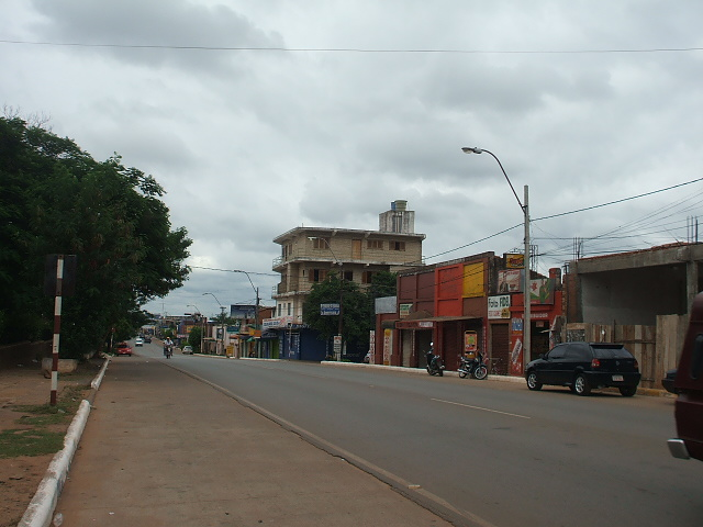 calle en el centro de oviedo